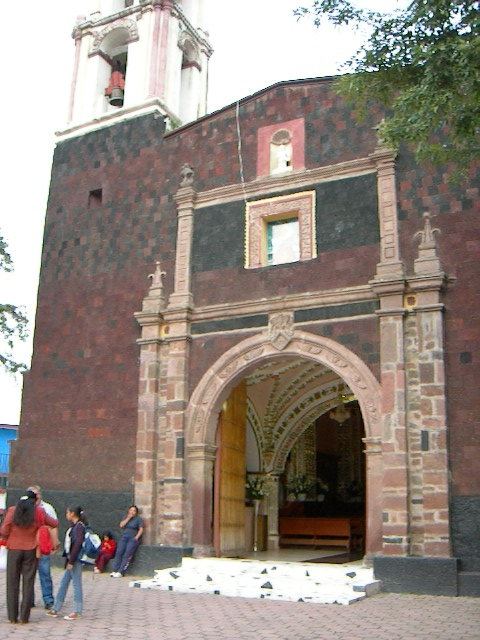 En la imagen se aprecia el atrio de la Iglesia de Santa Cecilia Tepetlapa, Xochimilco.